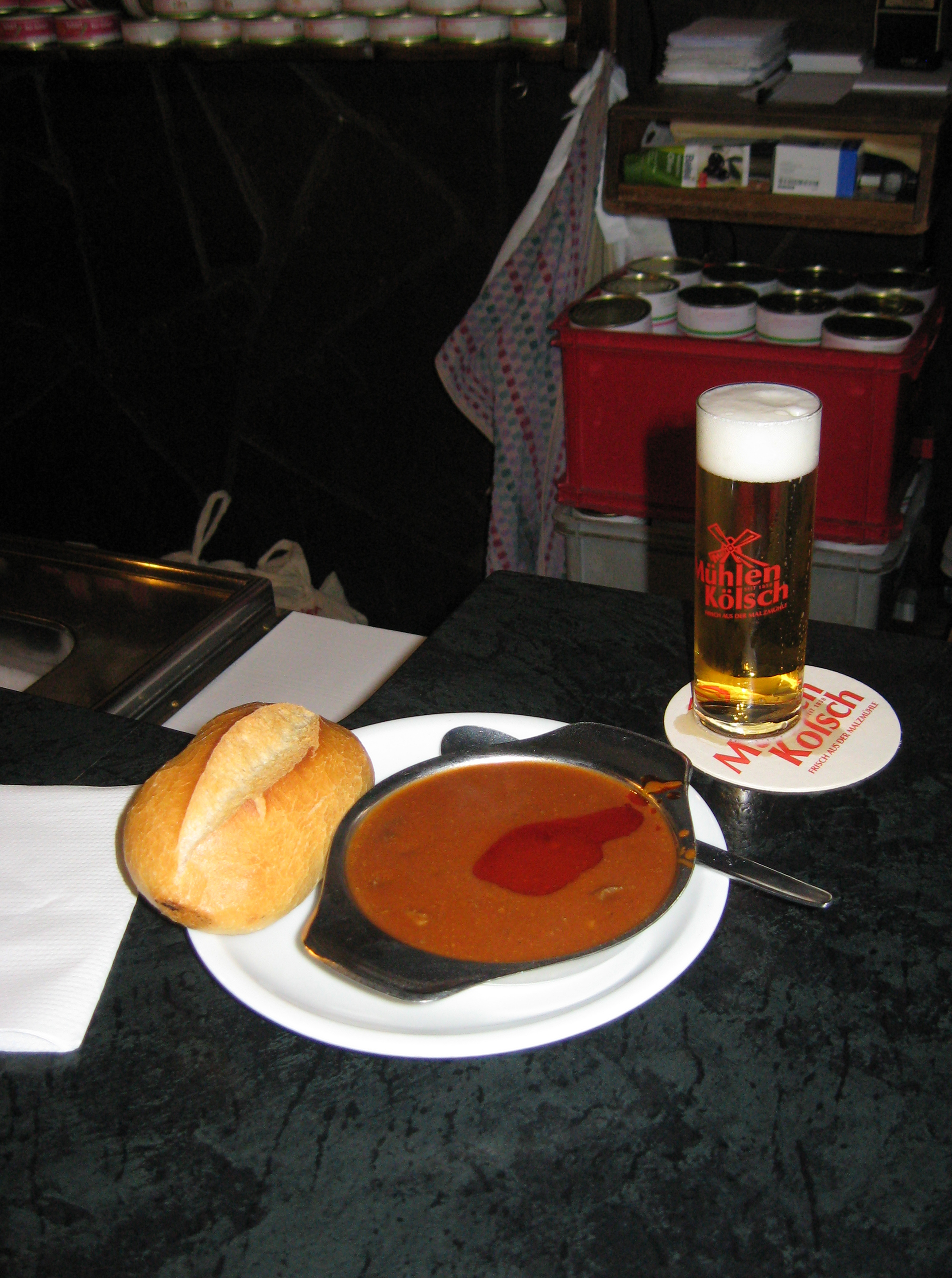 Traditioneller Puszta-Hütten-Gulasch mit Brötchen (und Mühlen-Kölsch) Datum: 22.01.2011 Urheber: B. Neulich alias Benutzer:Neulich im Roxy Kino Quelle: Privates Fotoarchiv des Urhebers